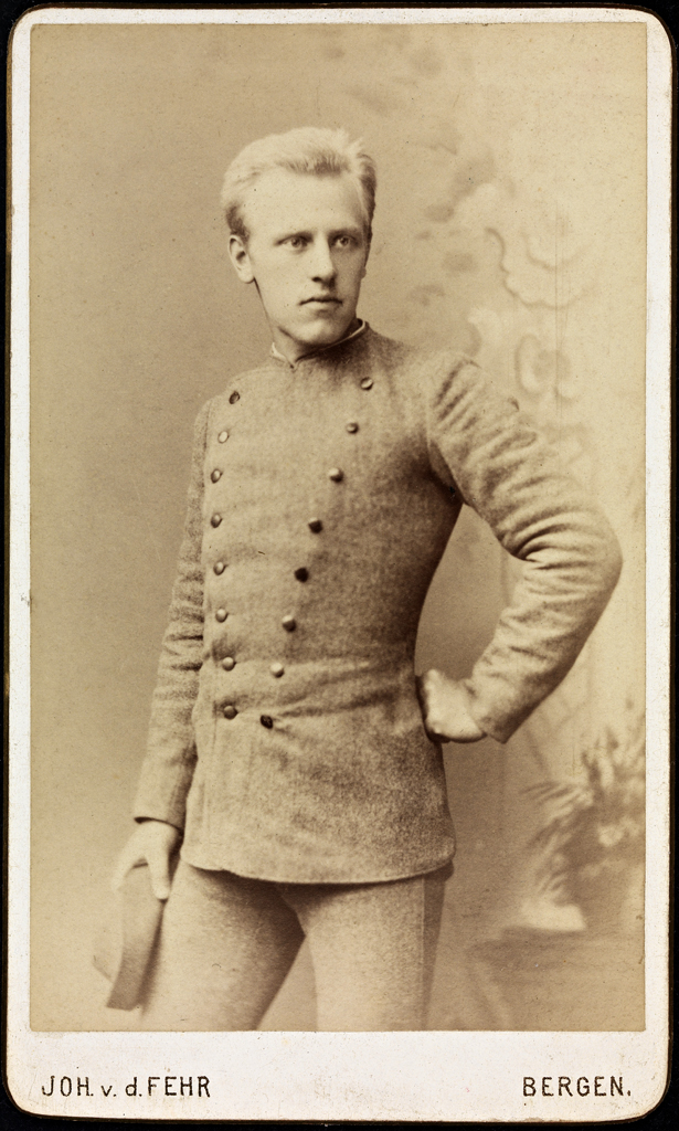 Tittel / Title: Fridtjof Nansen, 1885 Motiv / Motif: Visittkort. Dato / Date: 1885 Fotograf / Photographer: Johan von der Fehr (Bergen) Sted / Place: Bergen Eier / Owner Institution: Nasjonalbiblioteket / National Library of Norway Lenke / Link: Bildesignatur / Image Number: bldsa_1a007